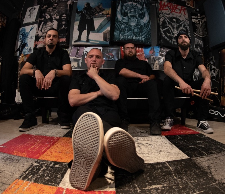 Одд Крю в тяхното студио